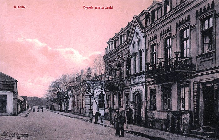 Synagoga w Koninie (widok z Rynku Garncarskiego)